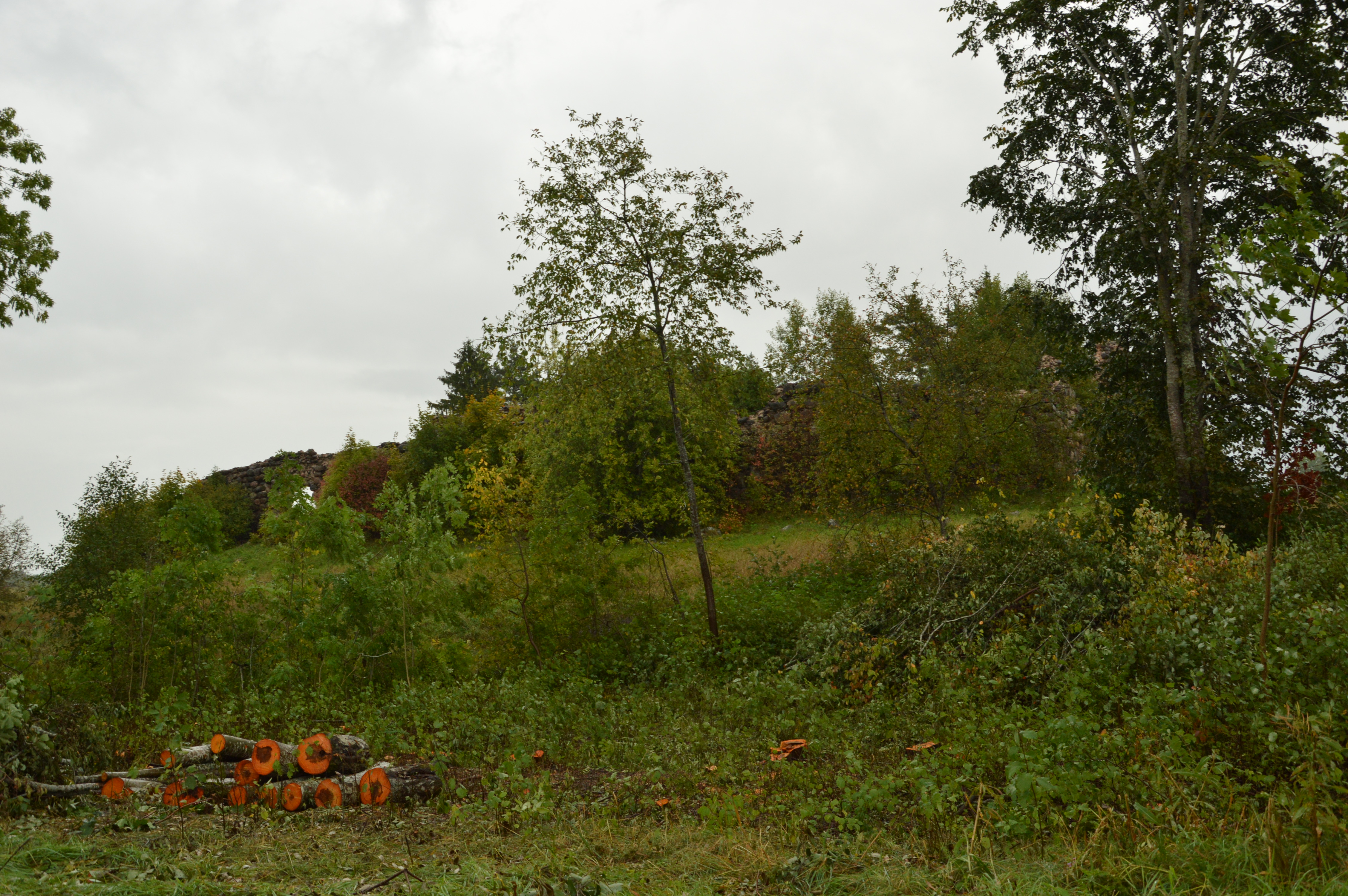 Vana-Pebalgi piiskopilinnus